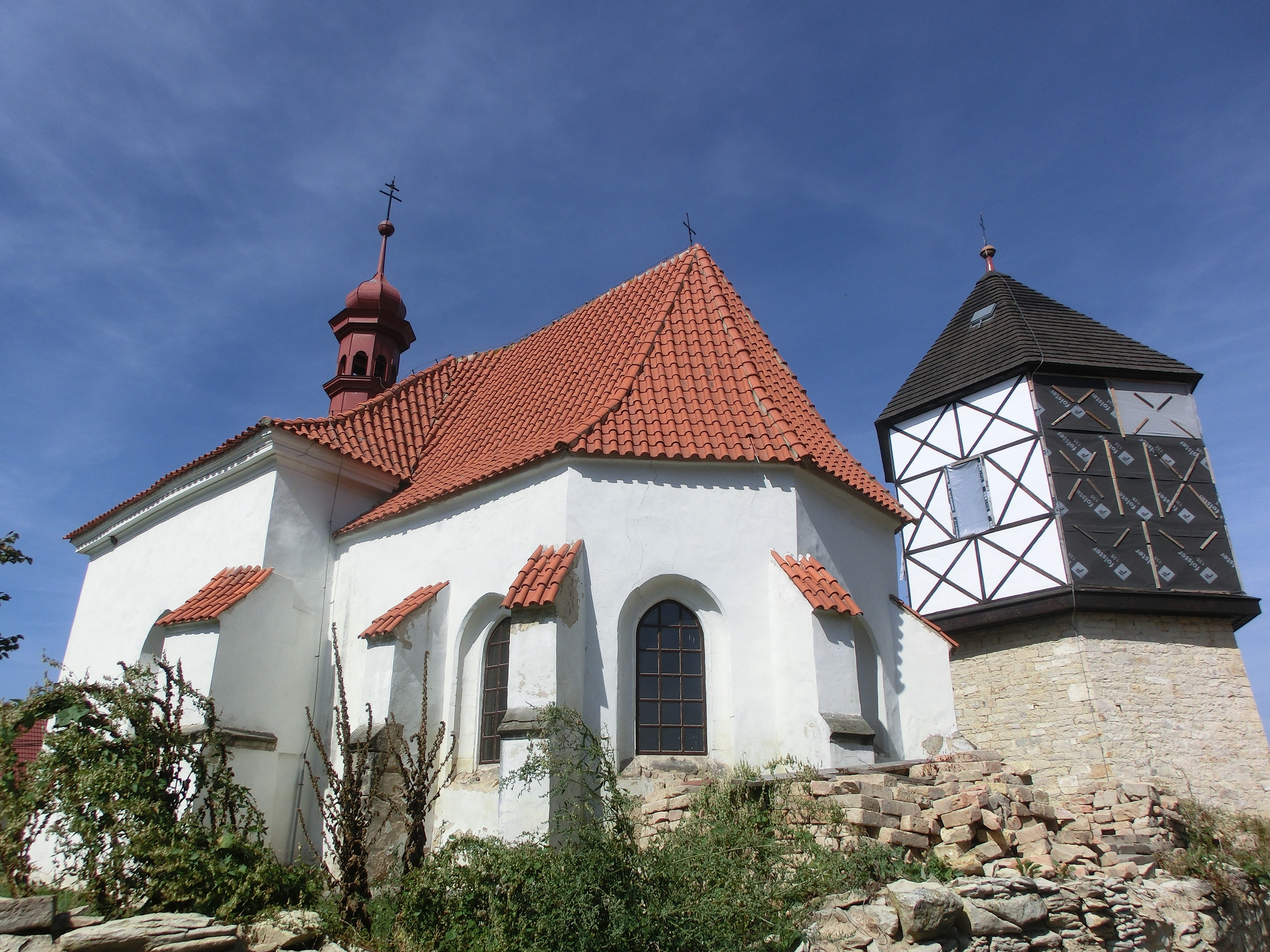 Kostel sv. Mikuláše (Lounky), Lounky